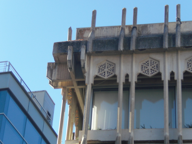 Urbodomo de Ciudad Real